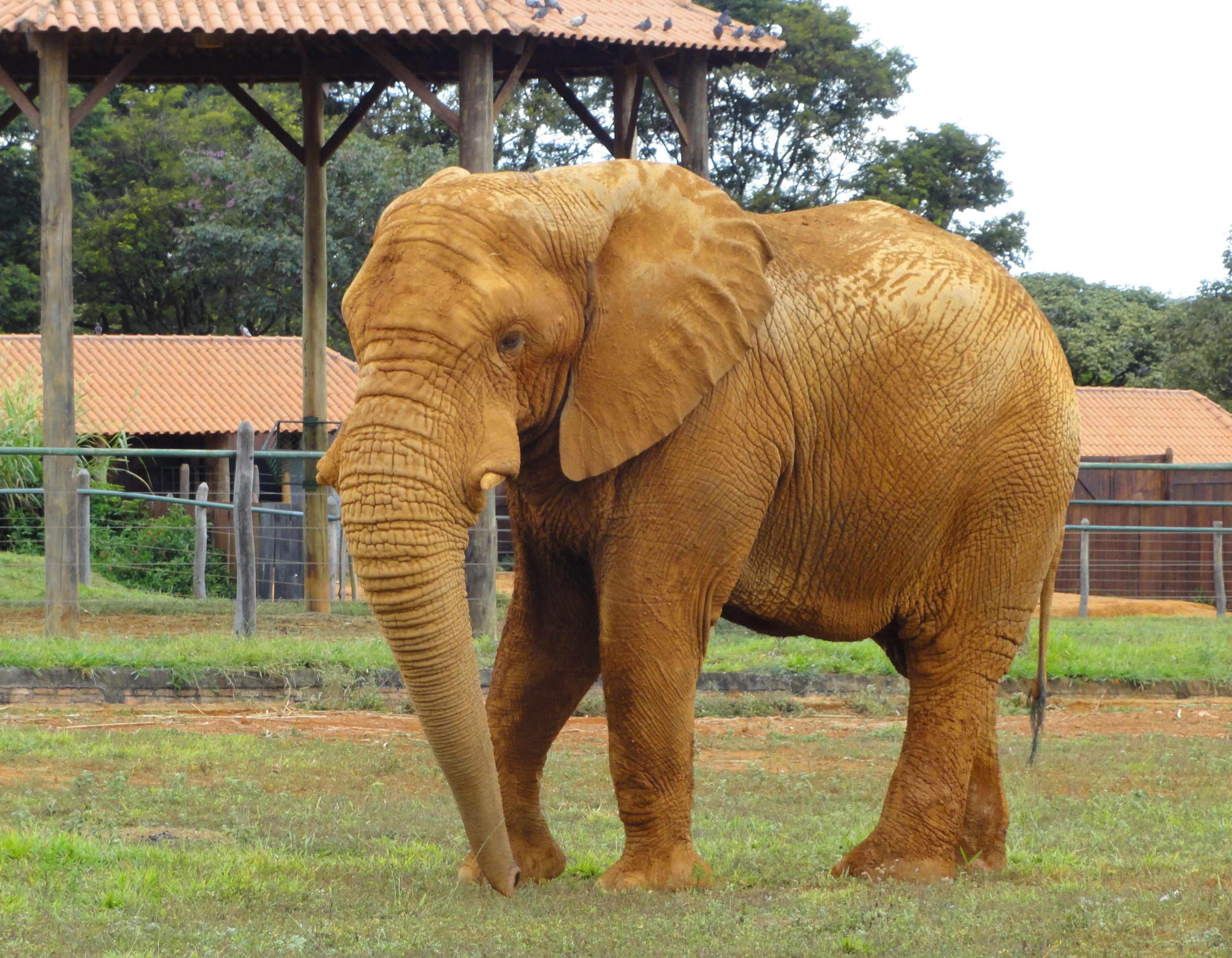 Jardim Zoológico de Brasília, Brasília, Brazil.